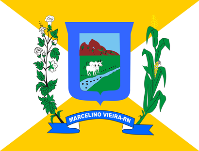 Bandeira de Marcelino Vieira, RN, Brasil